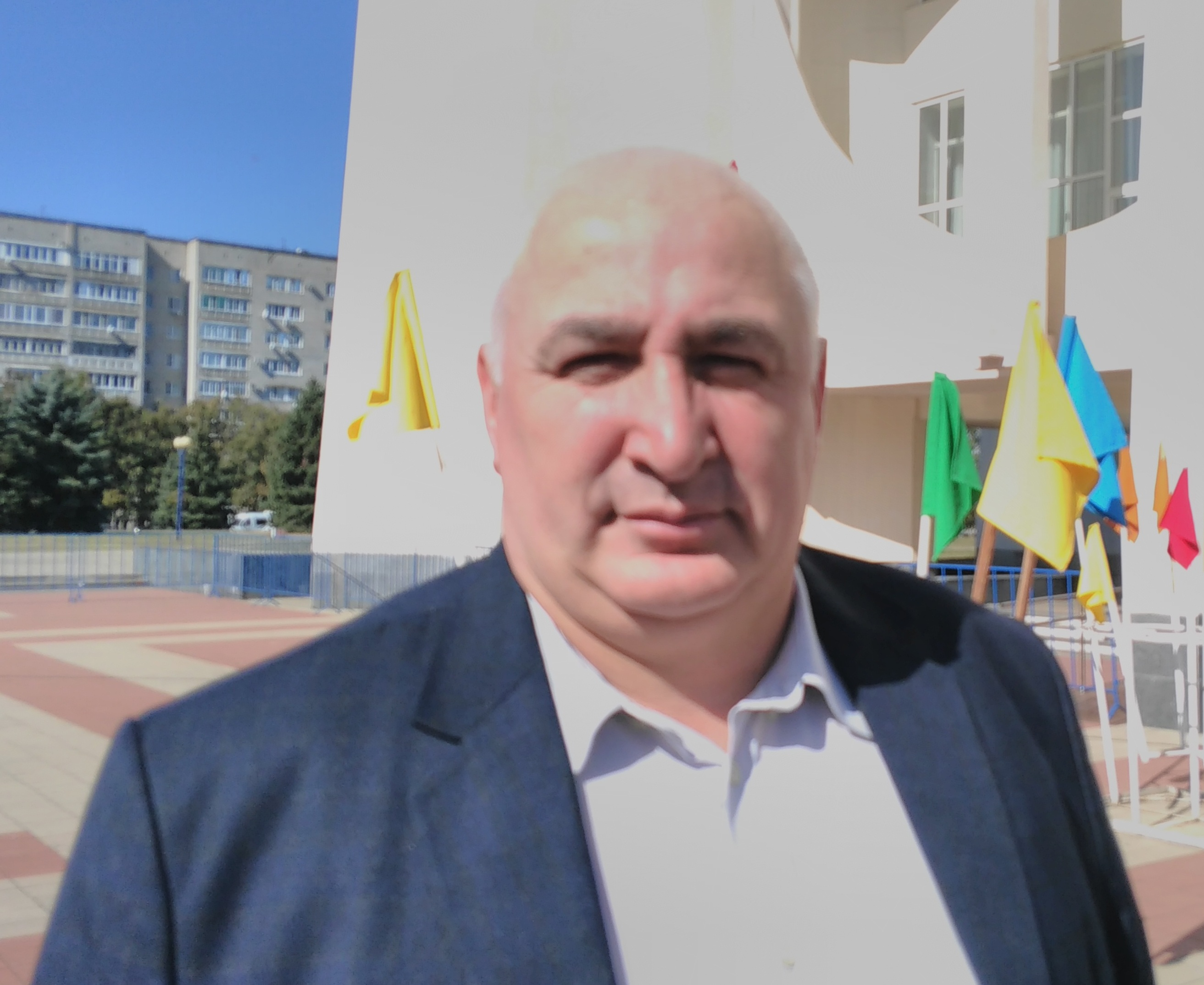 Мурат Хасанов Депутат Государственной Думы ФС РФ